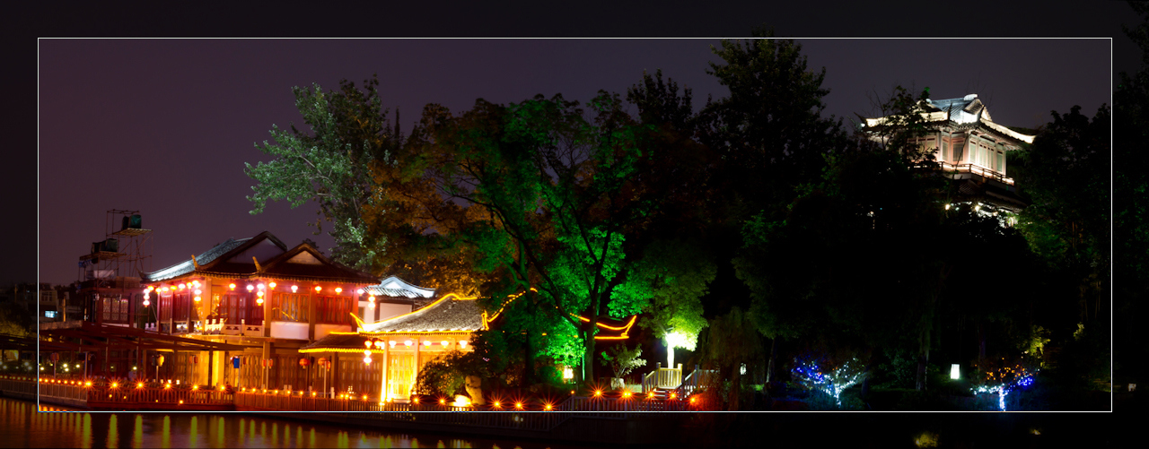 2010-7-24拍摄于南京白鹭洲公园，为两张照片拼接而成